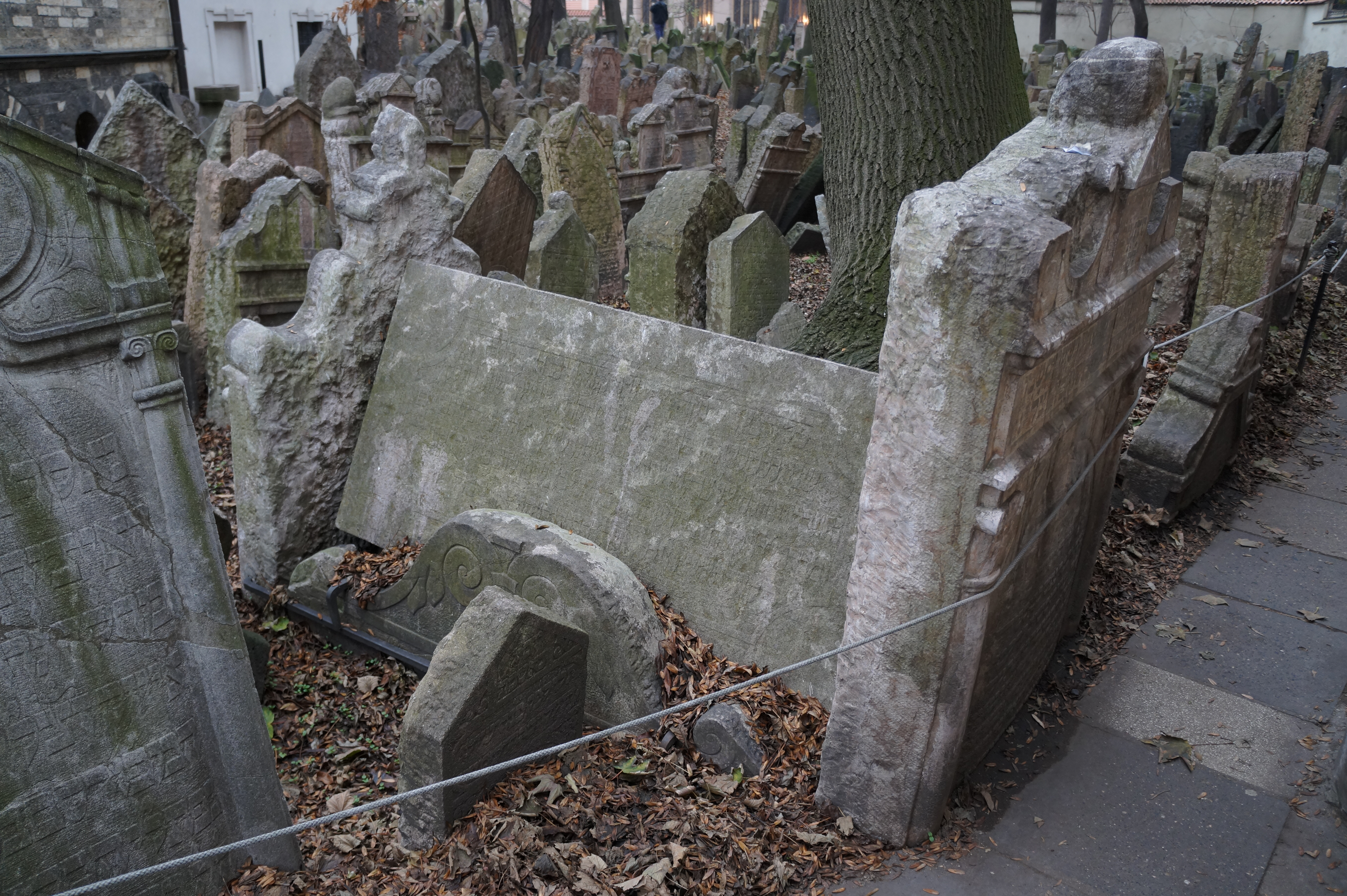 nahrobek r" jicchoka katze na starem židovskem hrbitove v praze